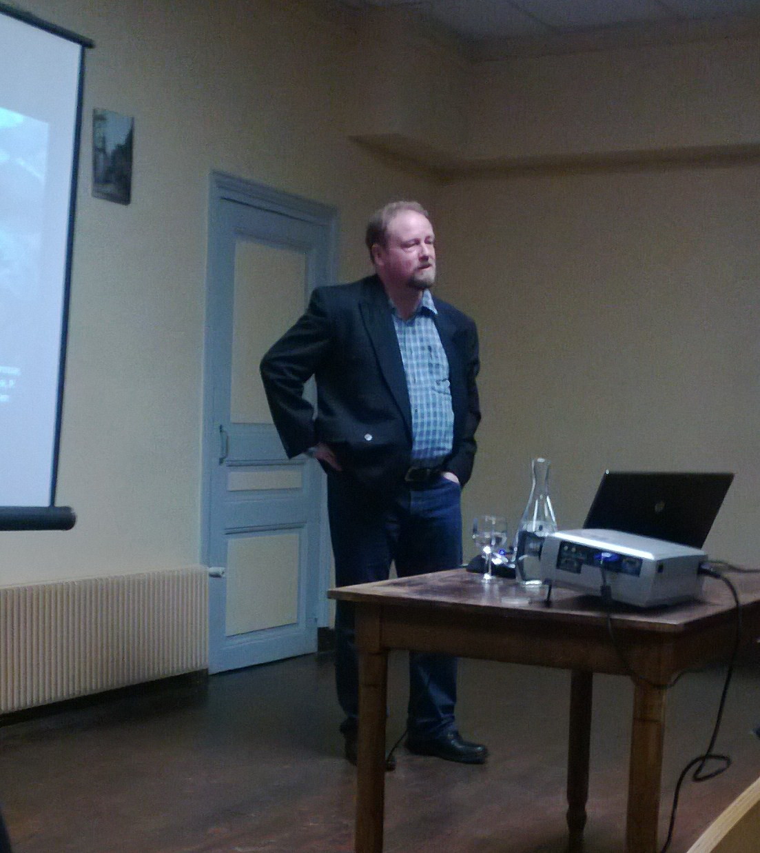 Harald floss en conférence à Saint-Martin-sous-Montaigu